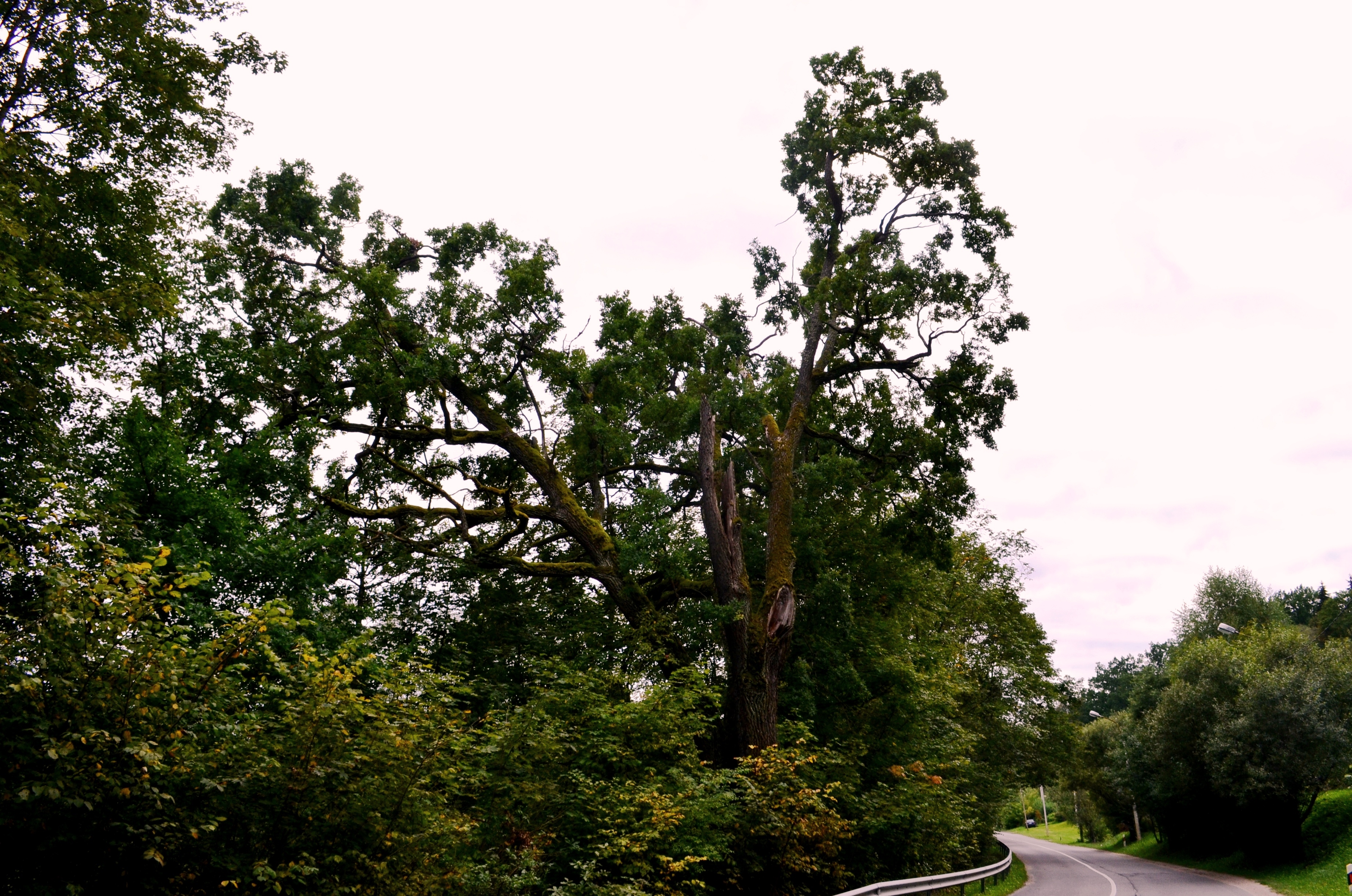 Senas ąžuolas Kučkuriškėse prie A.V.Kojalavičiaus gatvės, N. Vilnios sen., Vilnius